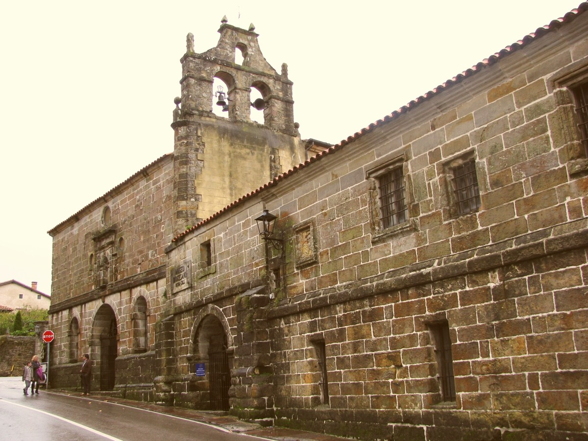 Museo Diocesano Regina Coeli - Santillana del Mar